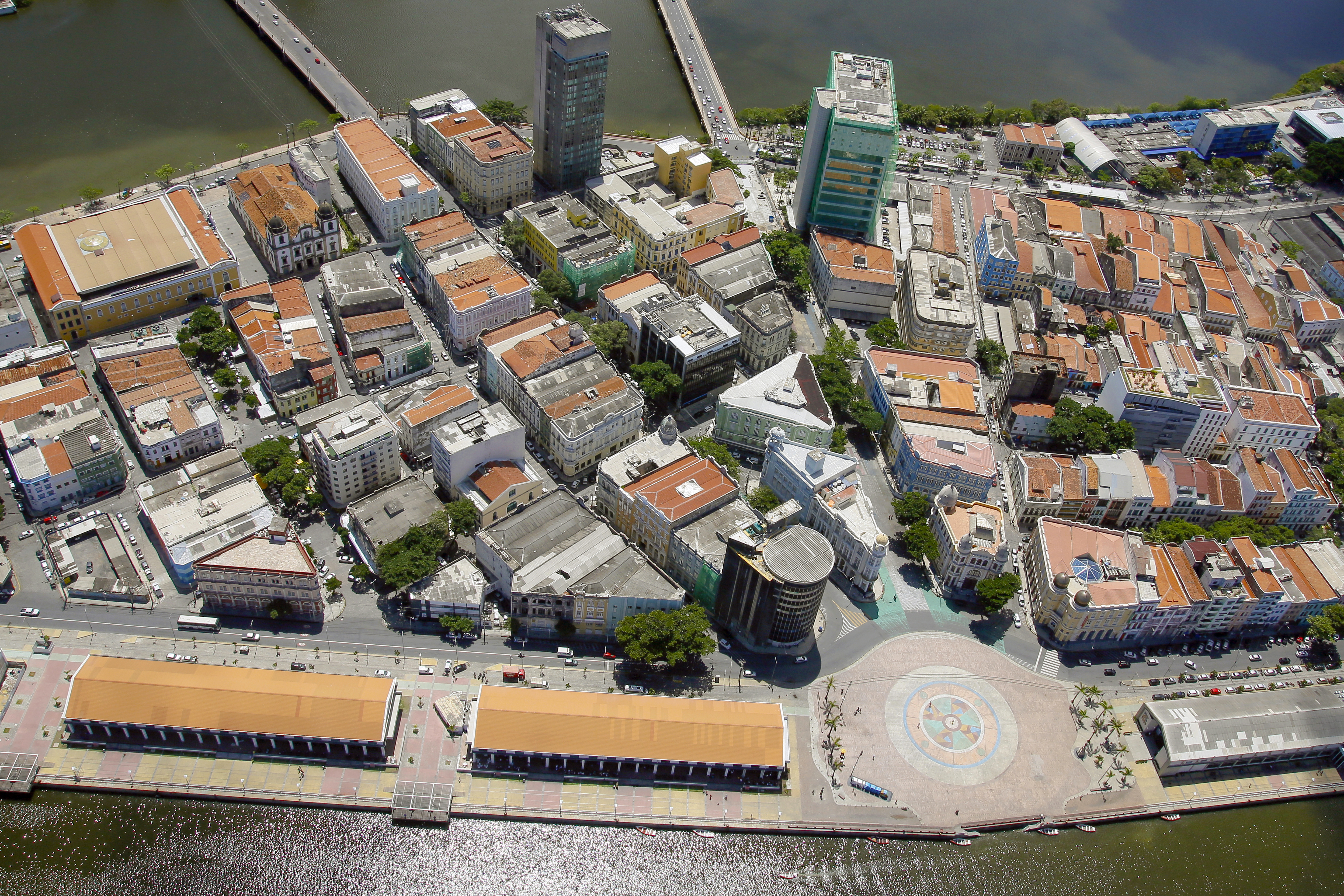 Conjunto Arquitetônico, Urbanístico e Paisagístico do Antigo Bairro do Recife